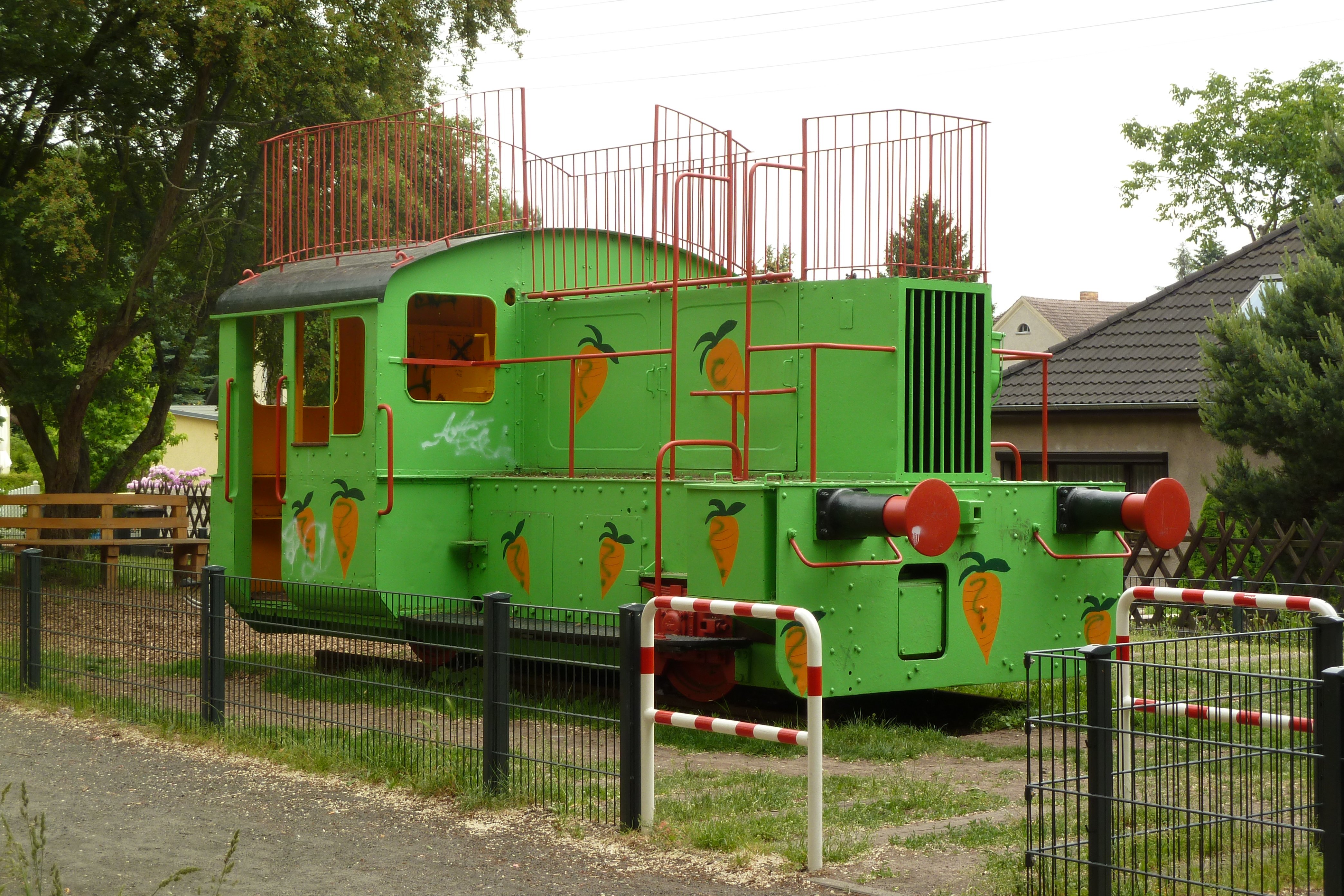 Kleinlok Kö 4902/100 704/310 704 als Spielplatzlok in Berlin-Bohndorf , Hundsfelder Straße 29.Mai 2011